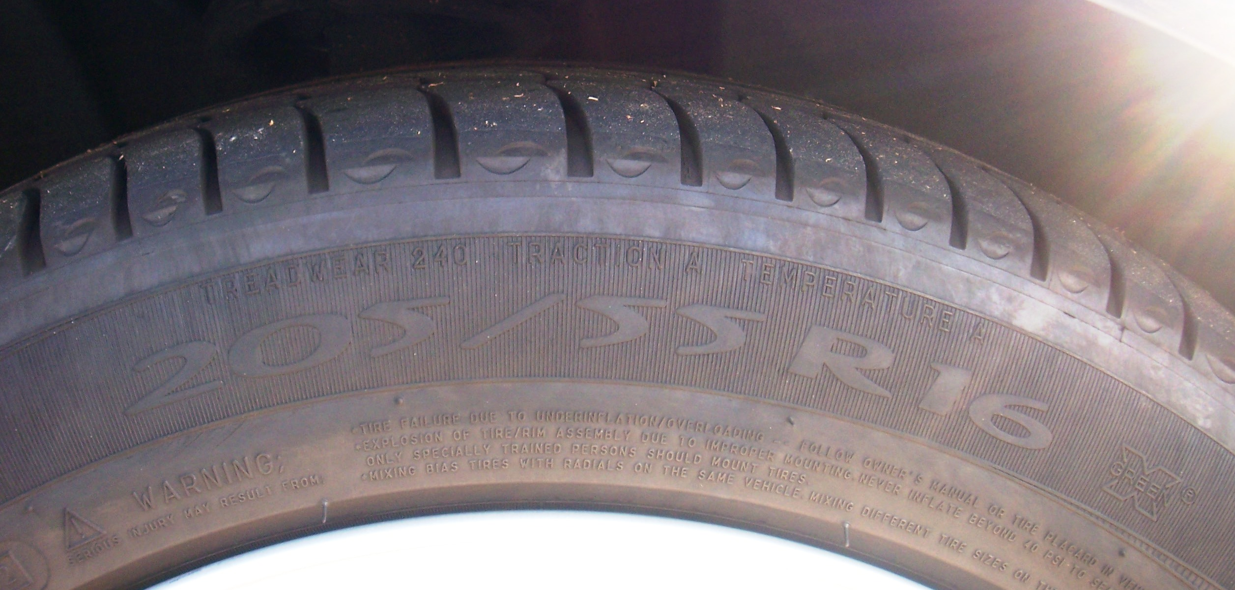 Pneu de um veículo mostrando as suas características